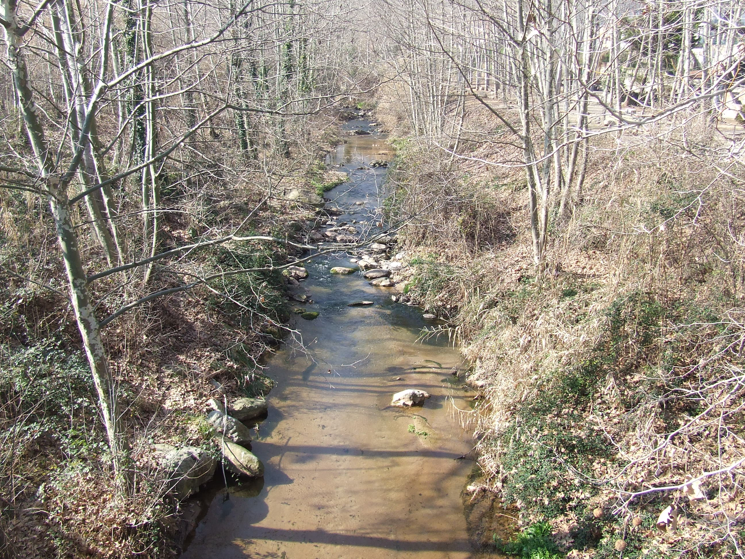 El Tenes, al seu pas per Bigues (Bigues i Riells, Vallès Oriental)